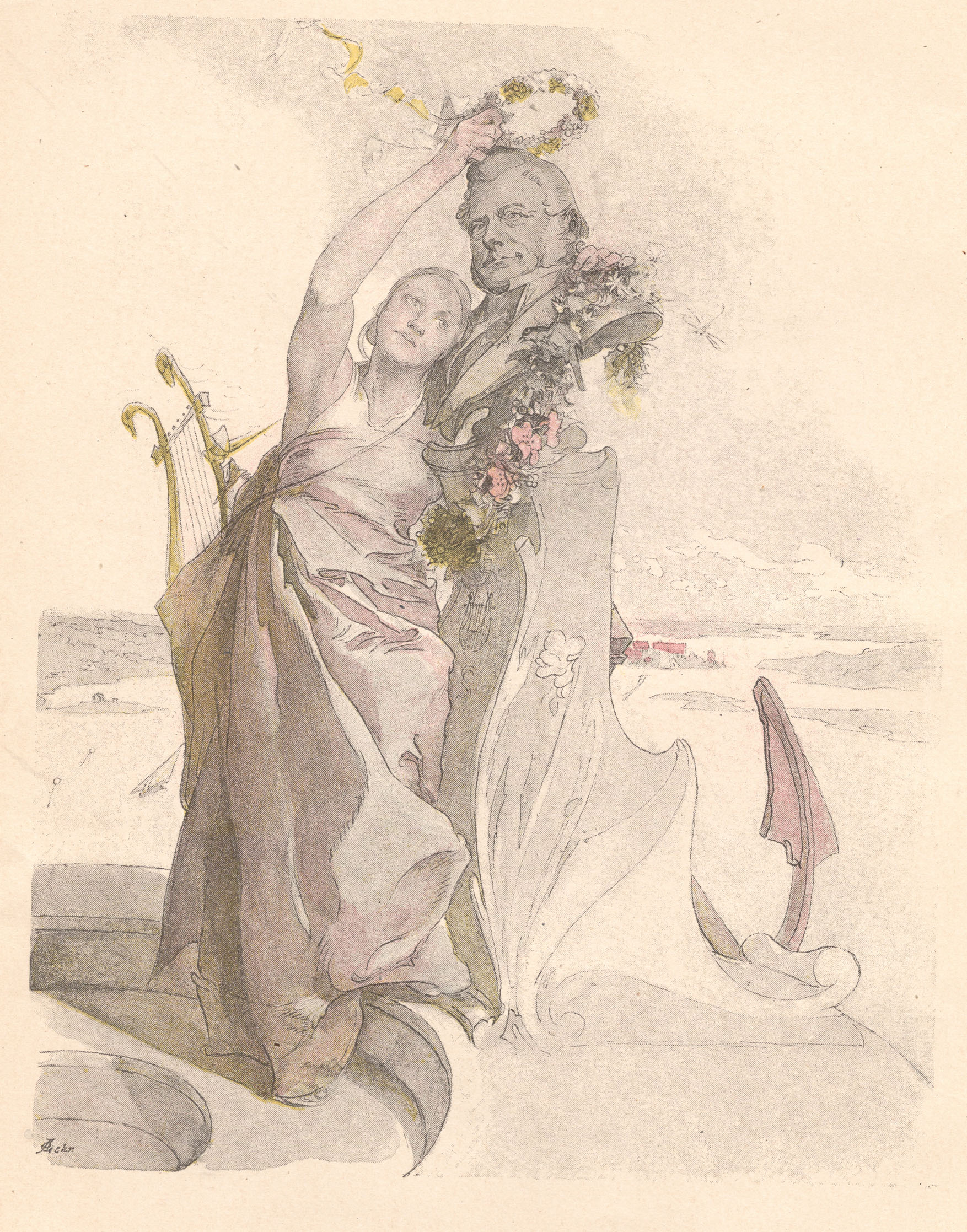 Sångmön blomsterkröner Elias Sehlstedt, en inledande illustration av Carl Larsson från 1890-talet till Carl Snoilskys urval av Elias Sehlstedts Sånger och Visor tryckt 1892/1893